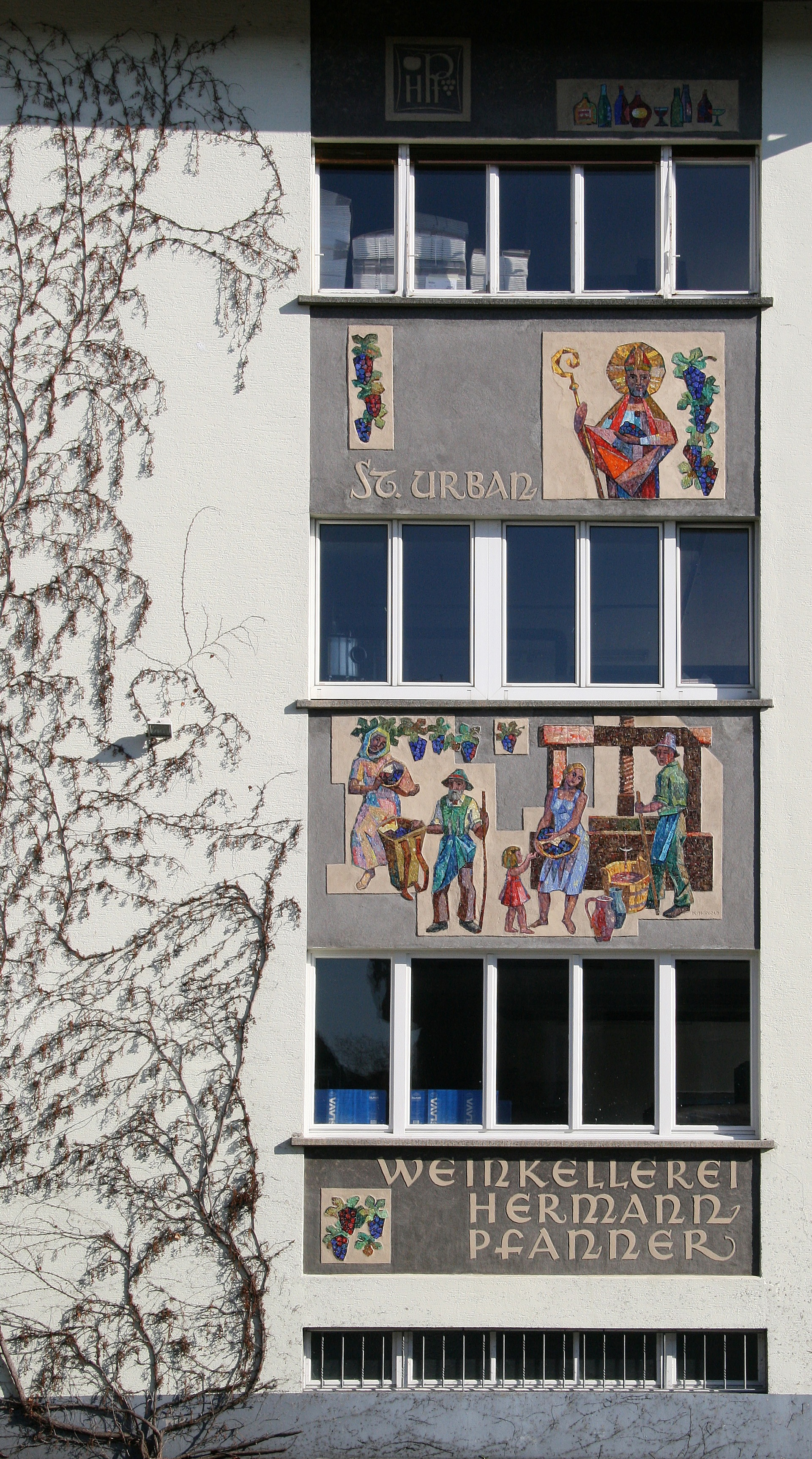 im Ortskern Fruchtsäfte Pfanner in Lauterach, Vorarlberg.